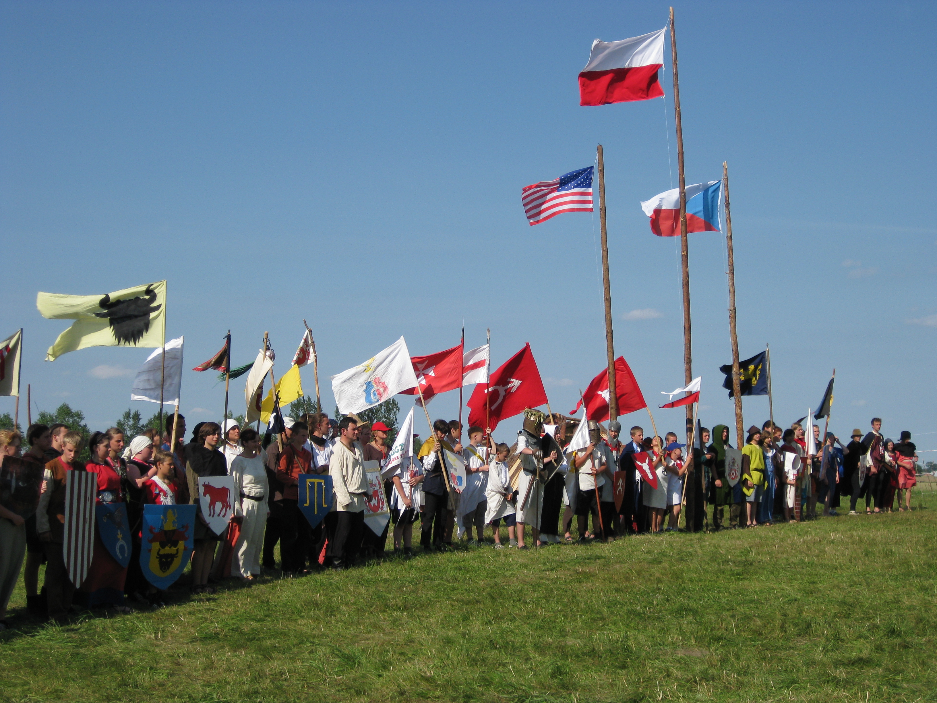 "Wspólnota Drużyn Grunwaldzkich" - XXXVIII Ogólnopolski Harcerski Zlot Grunwaldzki 2009